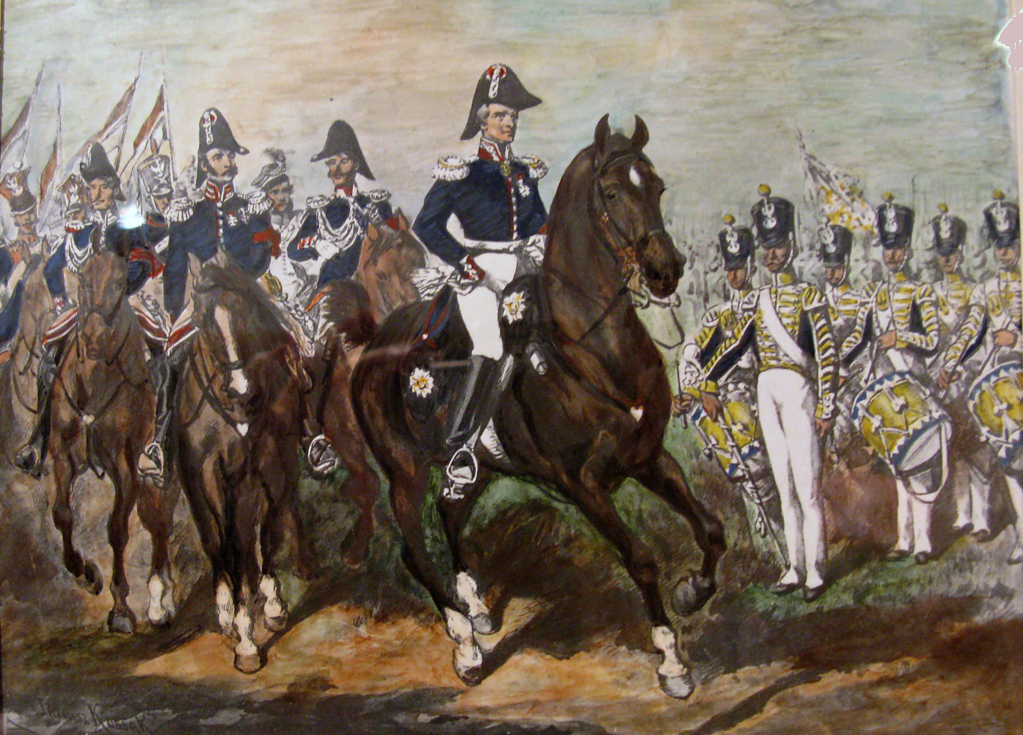 Anonymous postcard reproduction (published ca. 1909) of Generał Skrzynecki ze sztabem ("Gen. Skrzynecki with his staff"), an 1886 watercolour by Juliusz Kossak